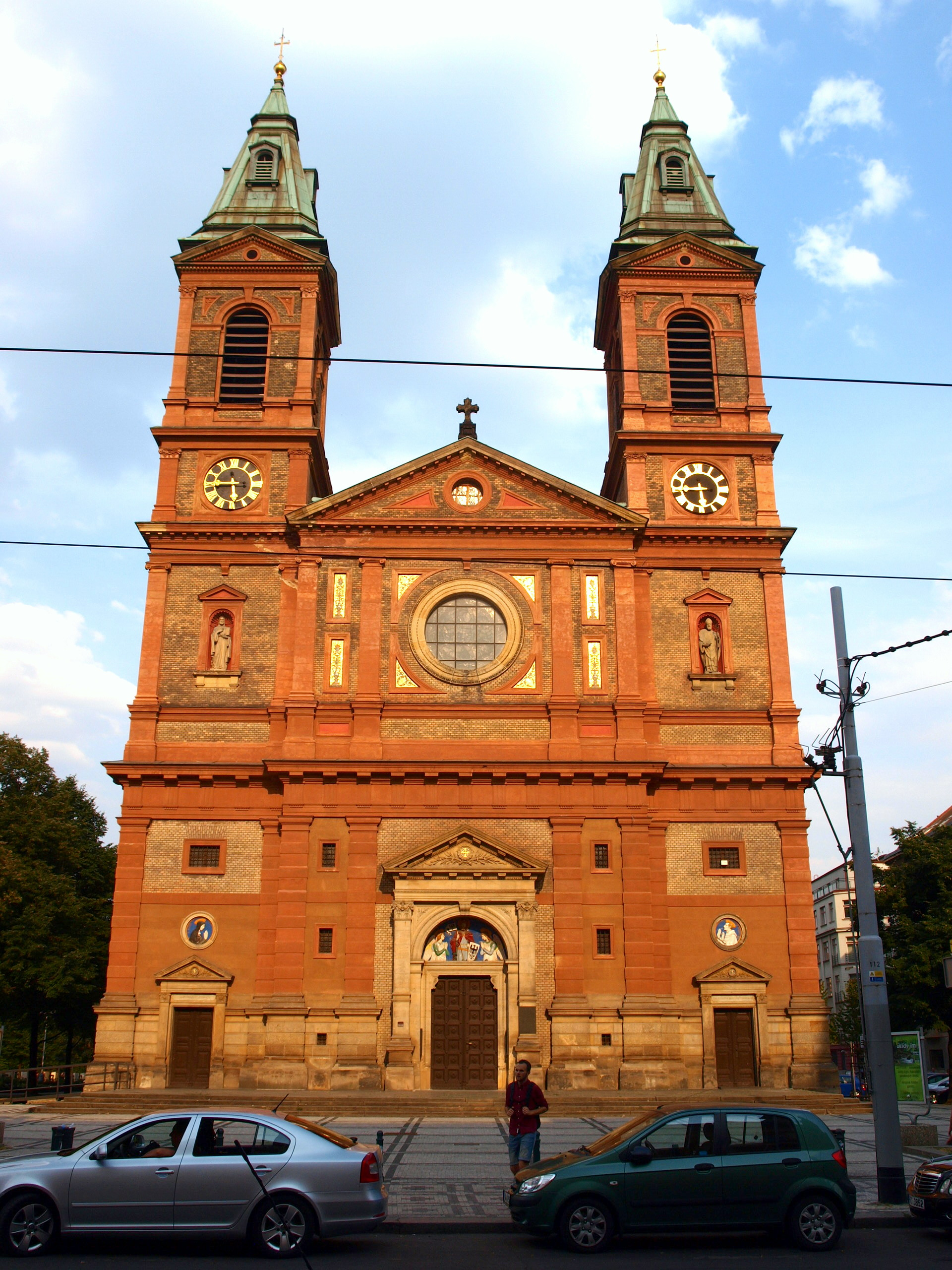 Kostel sv. Václava na Smíchově